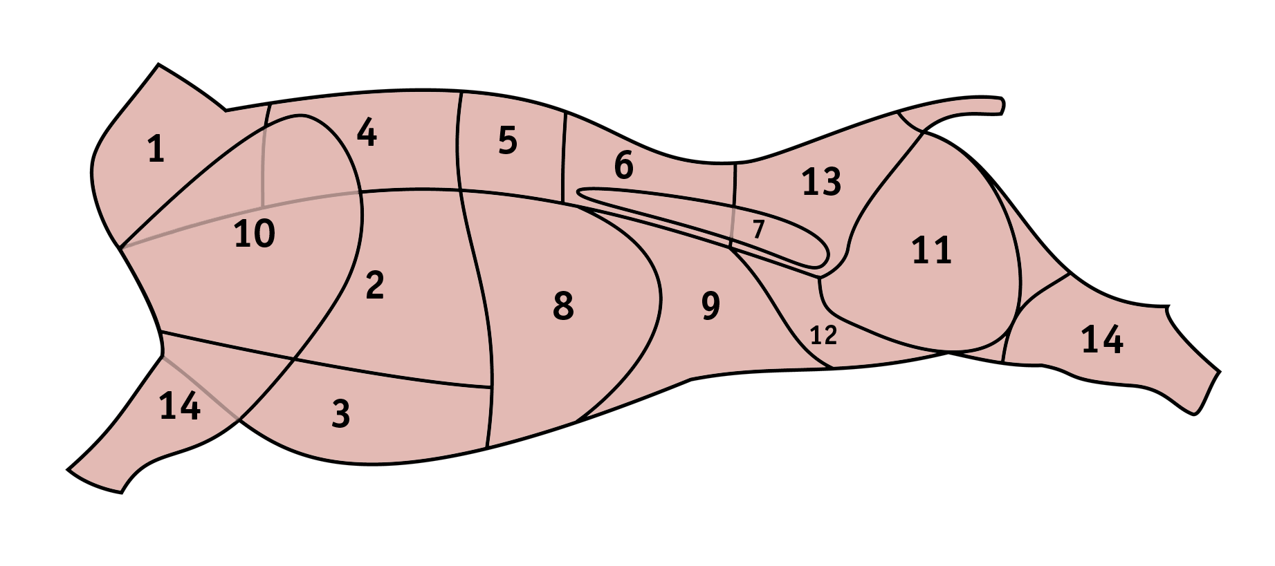 Schnittführung beim Rind. Rinderhals, Kamm oder Nacken Querrippe Rinderbrust Fehlrippe Hochrippe, Vorderrippe oder hohes Roastbeef Rostbraten oder flaches Roastbeef 5 und 6 bilden das Roastbeef oder Zwischenrippenstück Filet Spannrippe Dünnung Schulter, Bug oder Schaufel Oberschale, Unterschale und Nuss Flanke Hüfte mit Hüftsteak und Schwanzstück oder Tafelspitz Hesse oder Wade